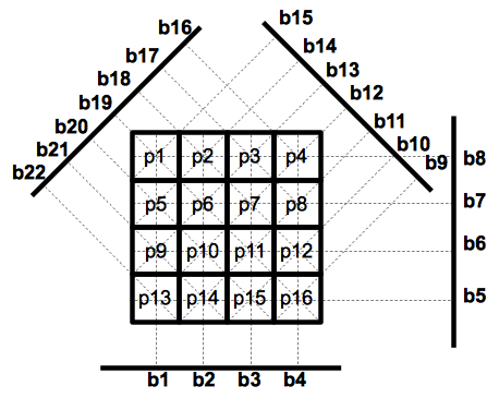 Mojette